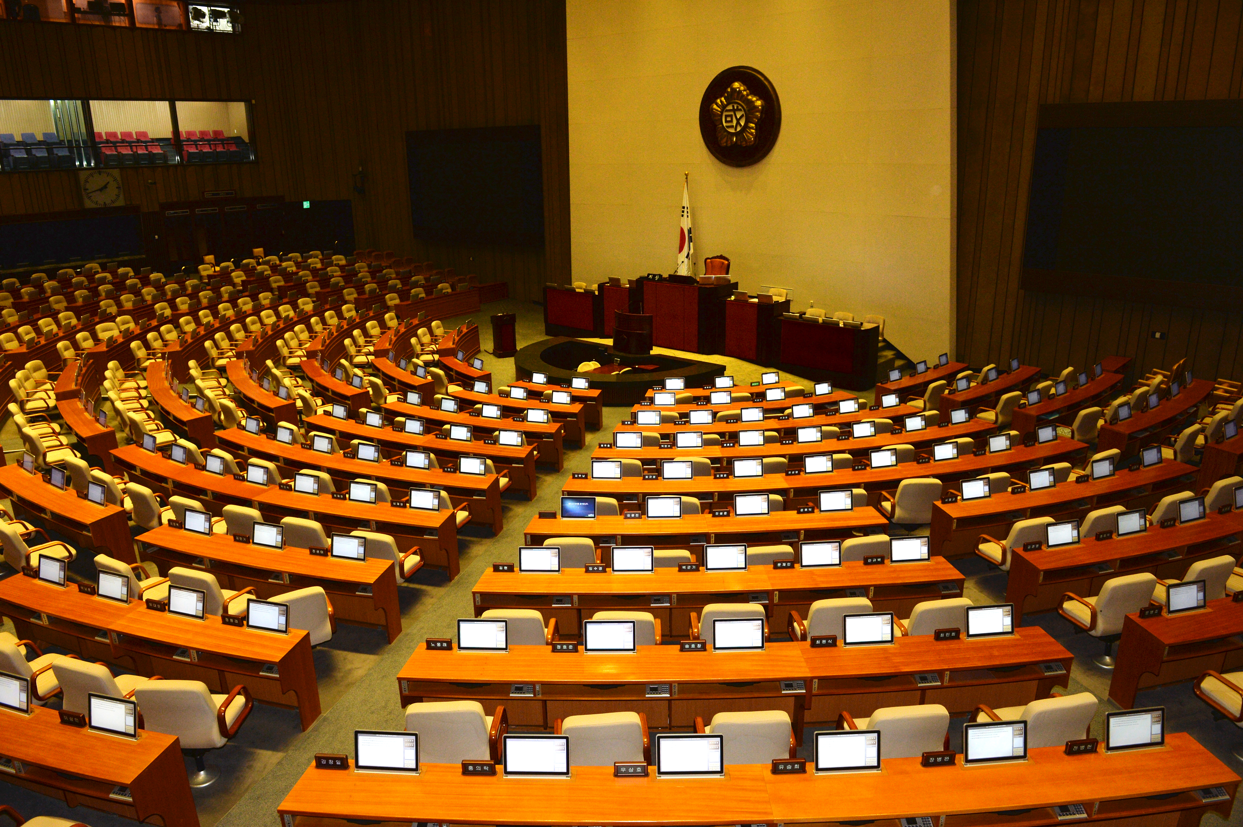 20140808다문화가족과 함께119서울투어